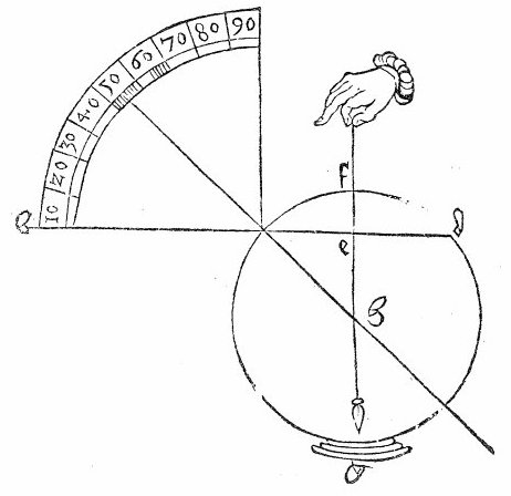 Ein wolgegründs kunstreichs Summari Büchlin/ aller Sonnen Vhr/ auff acht oder vier eckete stecklin/ in Büchsen/ Cylinder/ vnd auff Guldne ring/ Auch auff glaß/ alle mauren/ schreg oder vnschreg zůmachen. Auch wie man alle schrege vnd außschlag der grad an yedem hauß oder fenster/ leichtlich vnd gerecht finden solle.